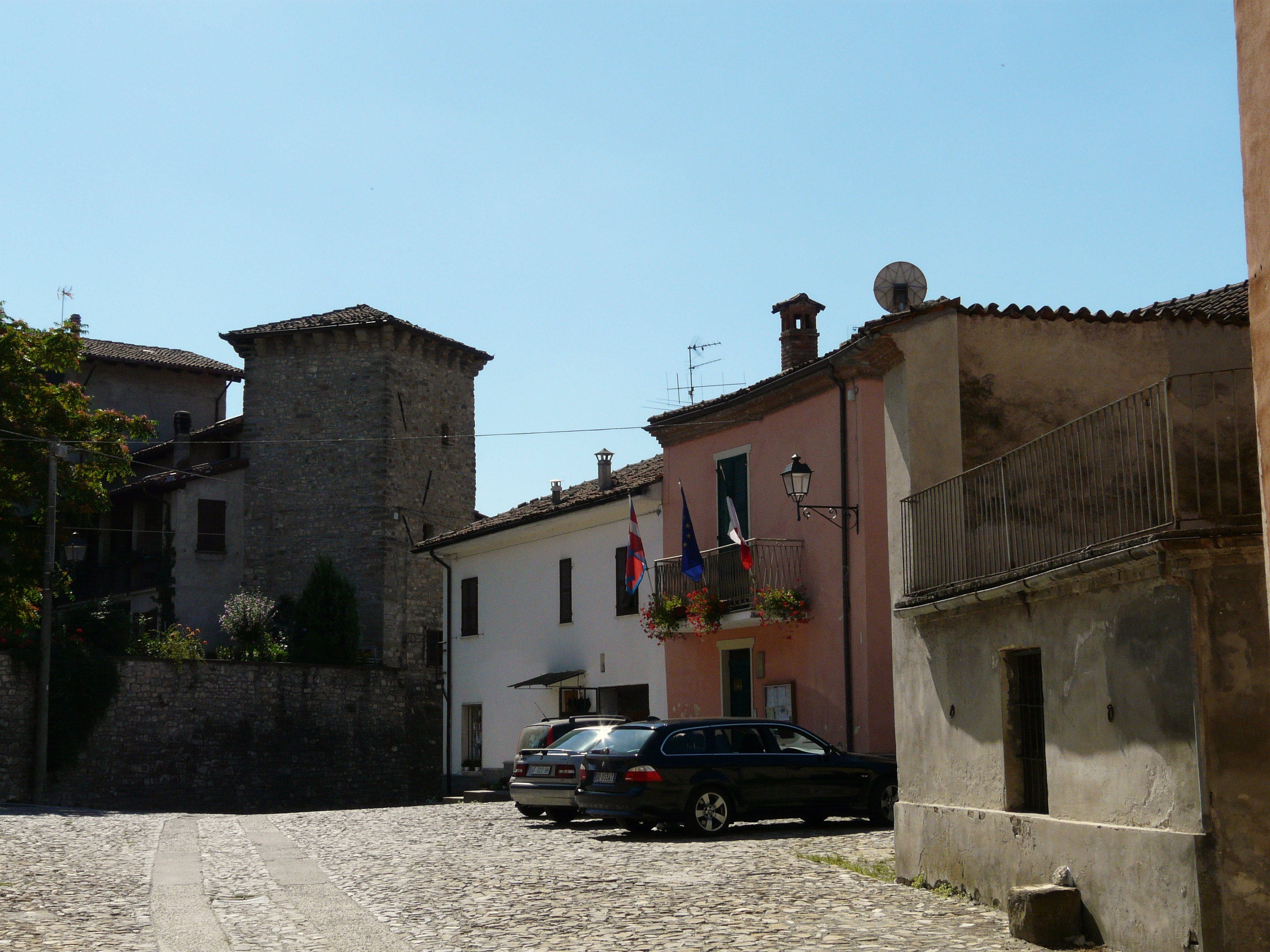 Centro storico di Gremiasco, Piemonte, Italia